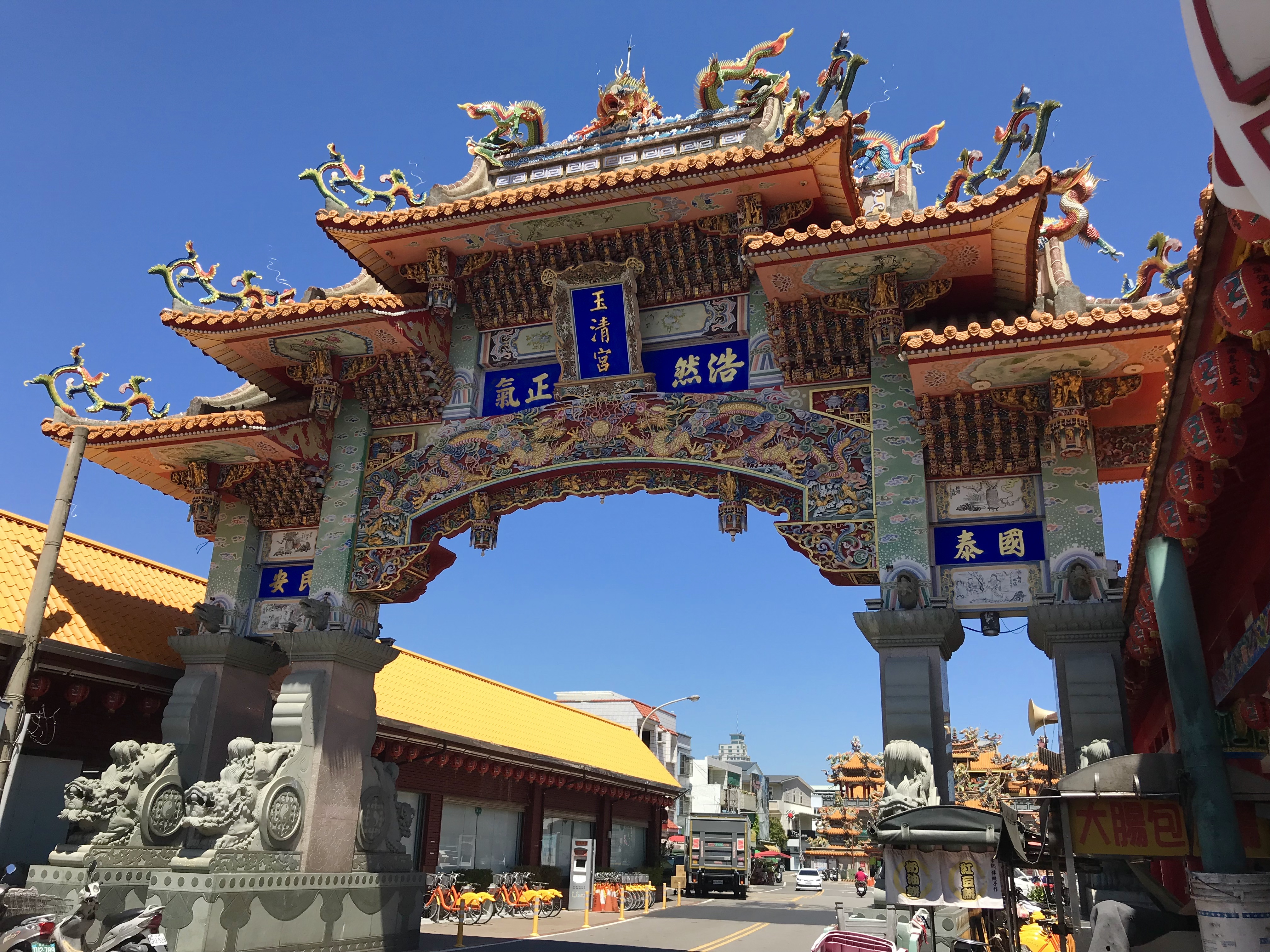 苗栗玉清宮牌樓